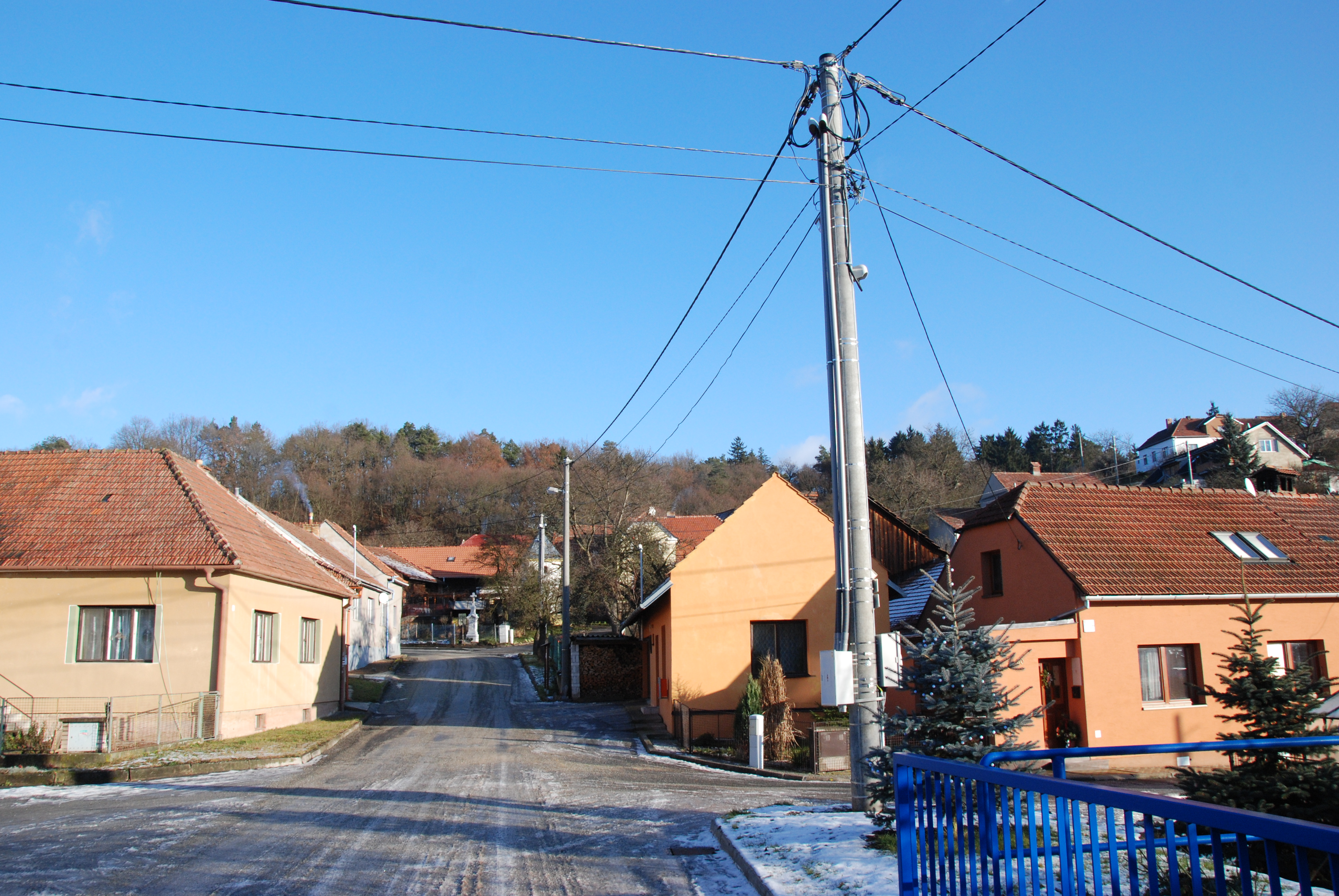 Lubě - silnice